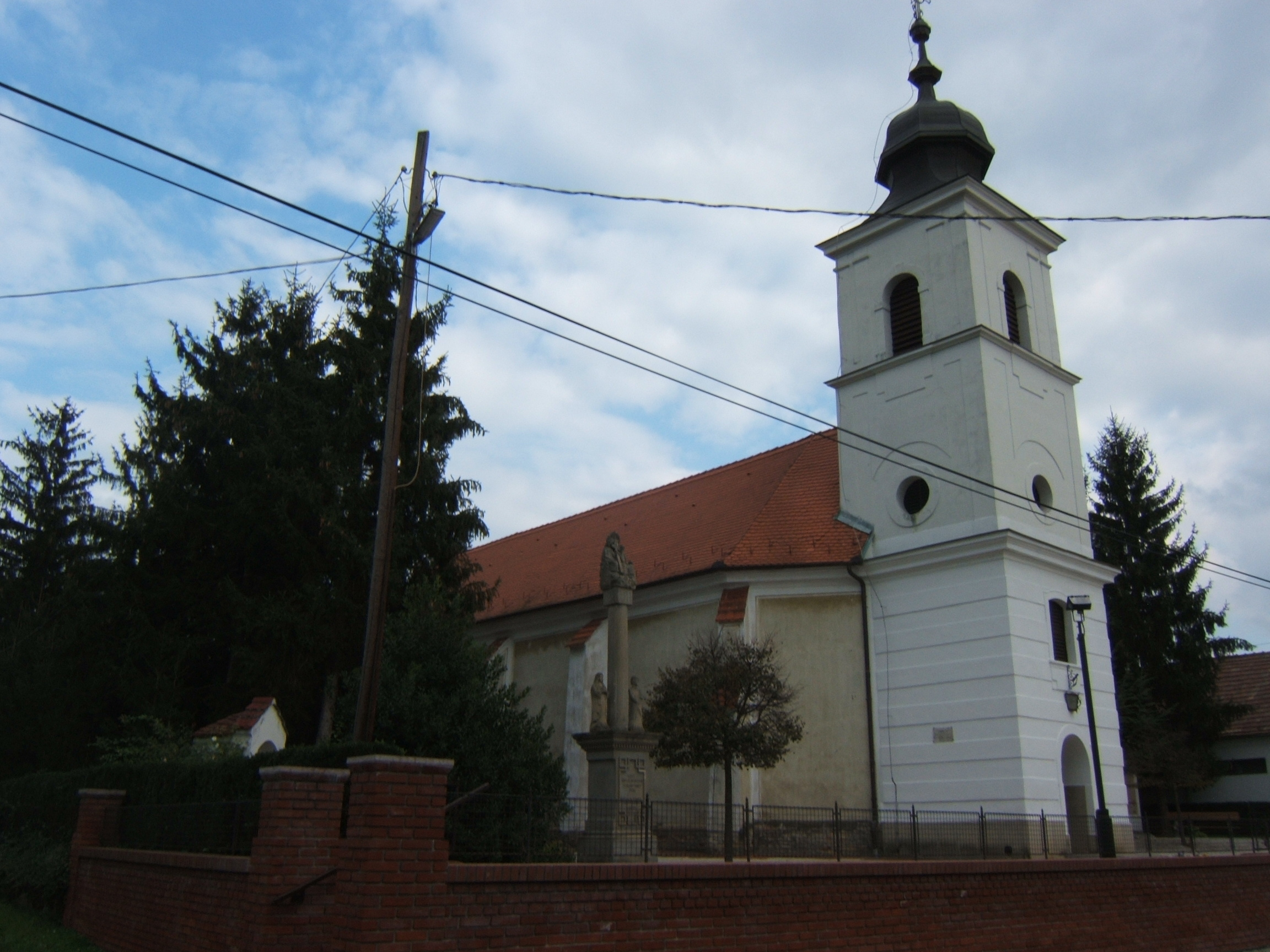 Balatonberény, Keresztelő Szent János-templom